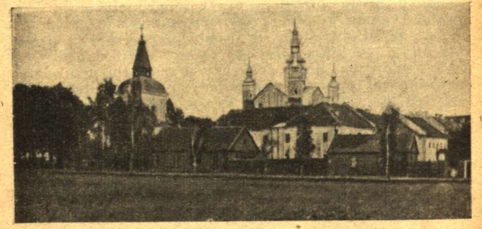 Obecnie Monaster Zwiastowania Przenajświętszej Bogurodzicy i św. Jana Teologa w Supraślu.